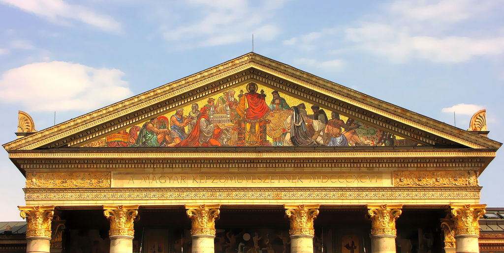 M?csarnok